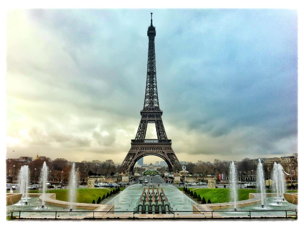 Tour Eiffel